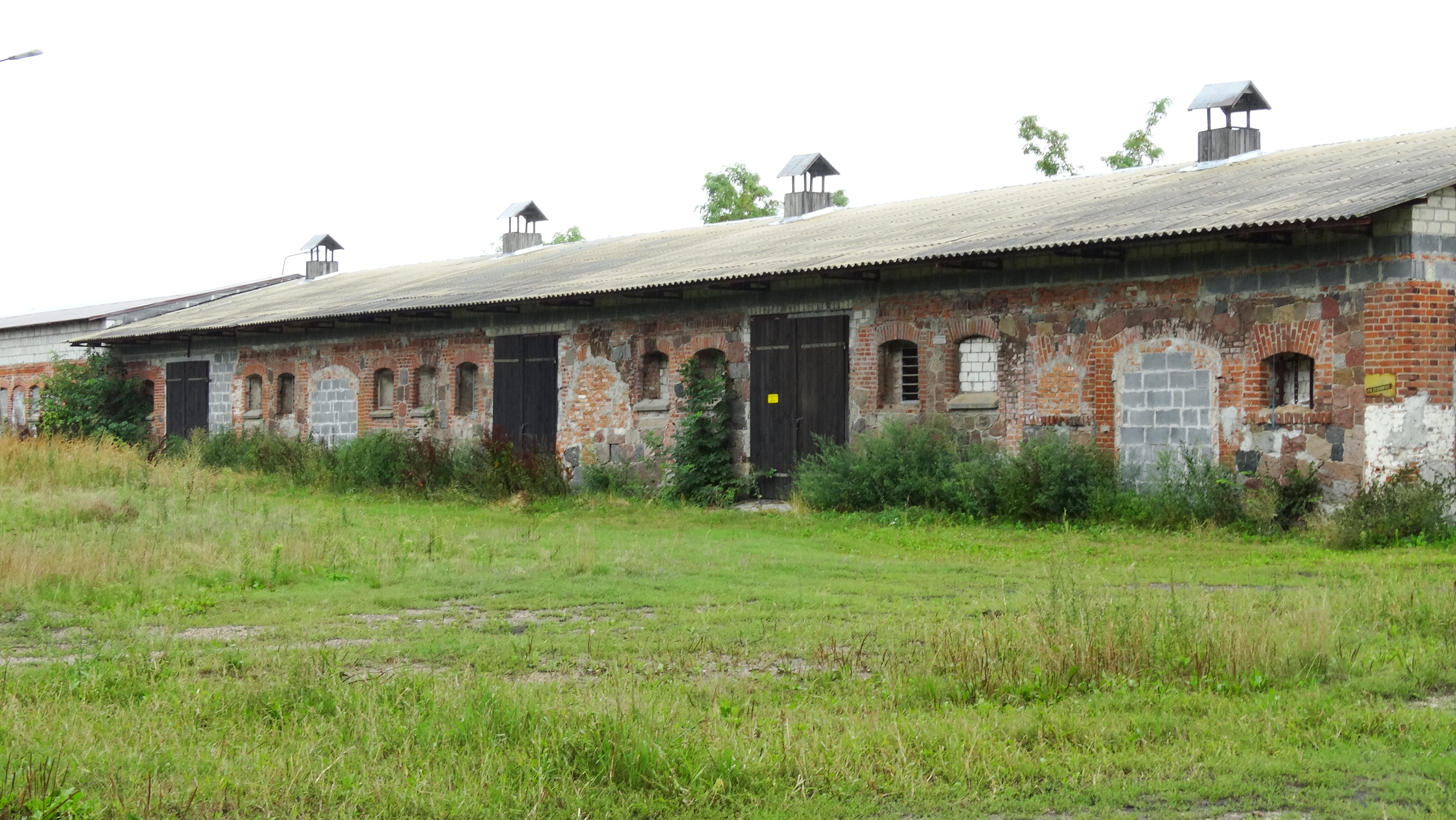 Kaczkówko - owczarnia, pocz. XX